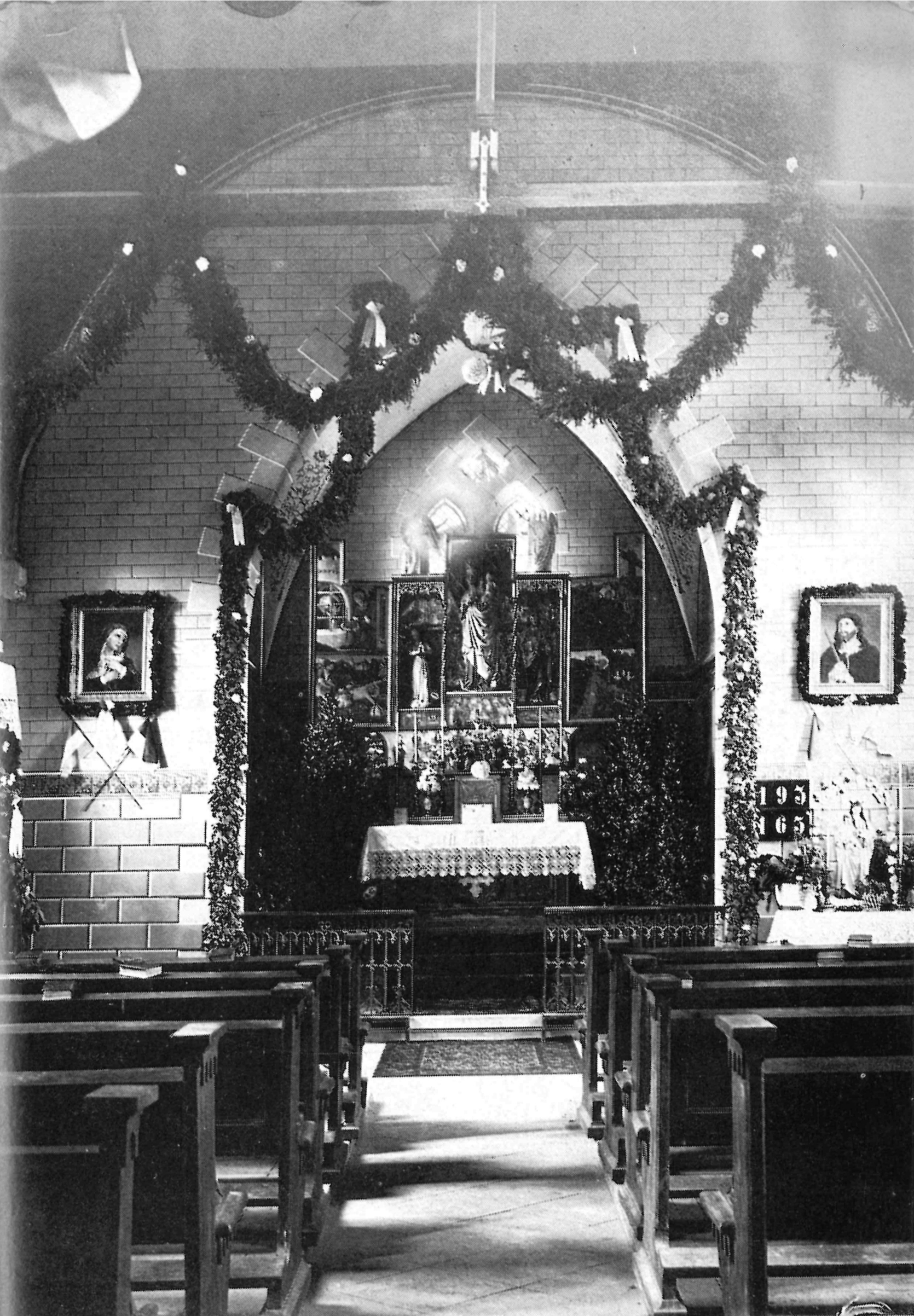 Innenansicht St. Joseph, Butzbach, Hessen, Deutschland